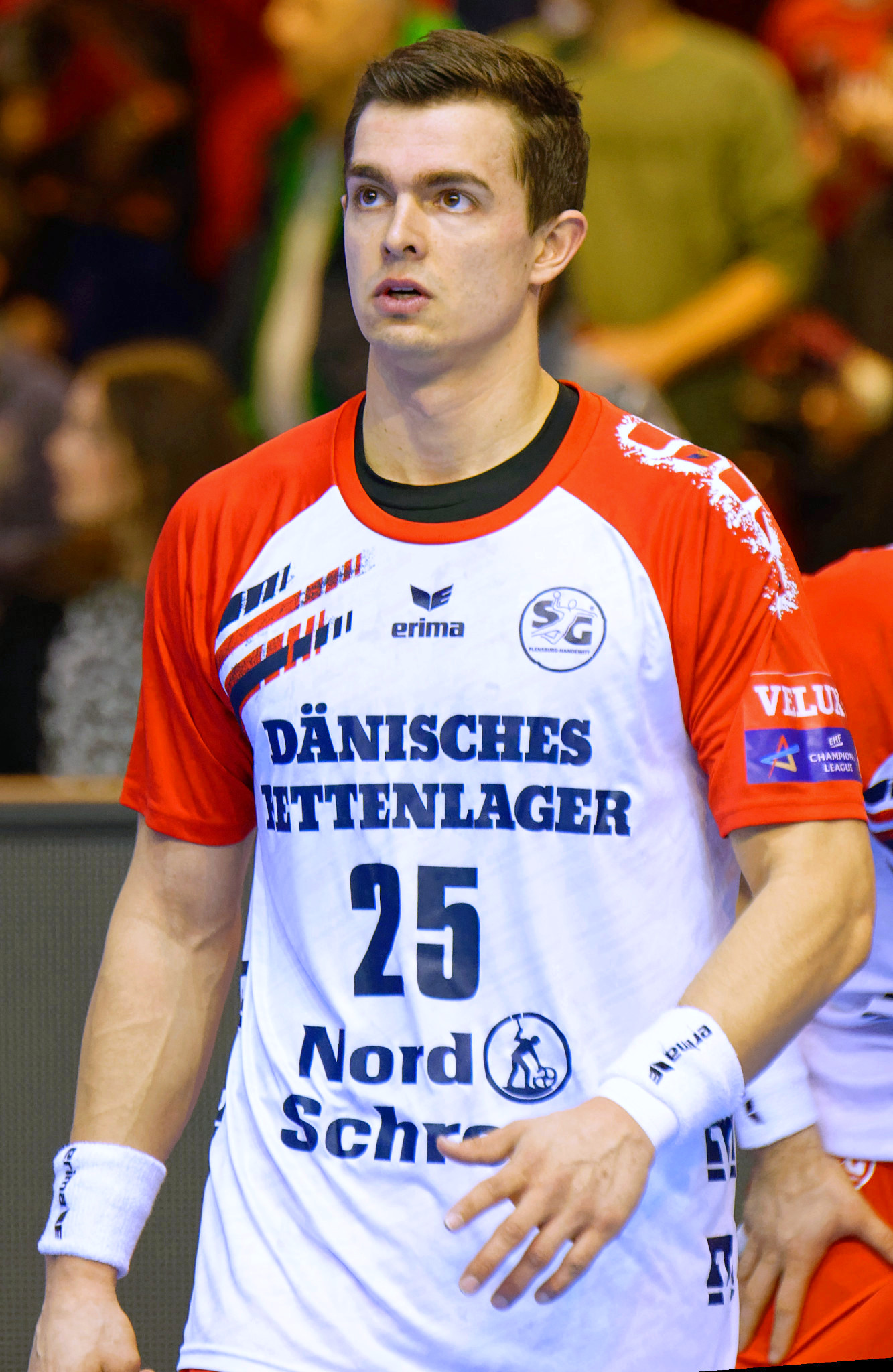 Rencontre de phase de groupe de la Ligue des Champions 2015-16 entre le PSG et SG Flensburg. A la Halle Carpentier (Paris), le 7 mars 2016.